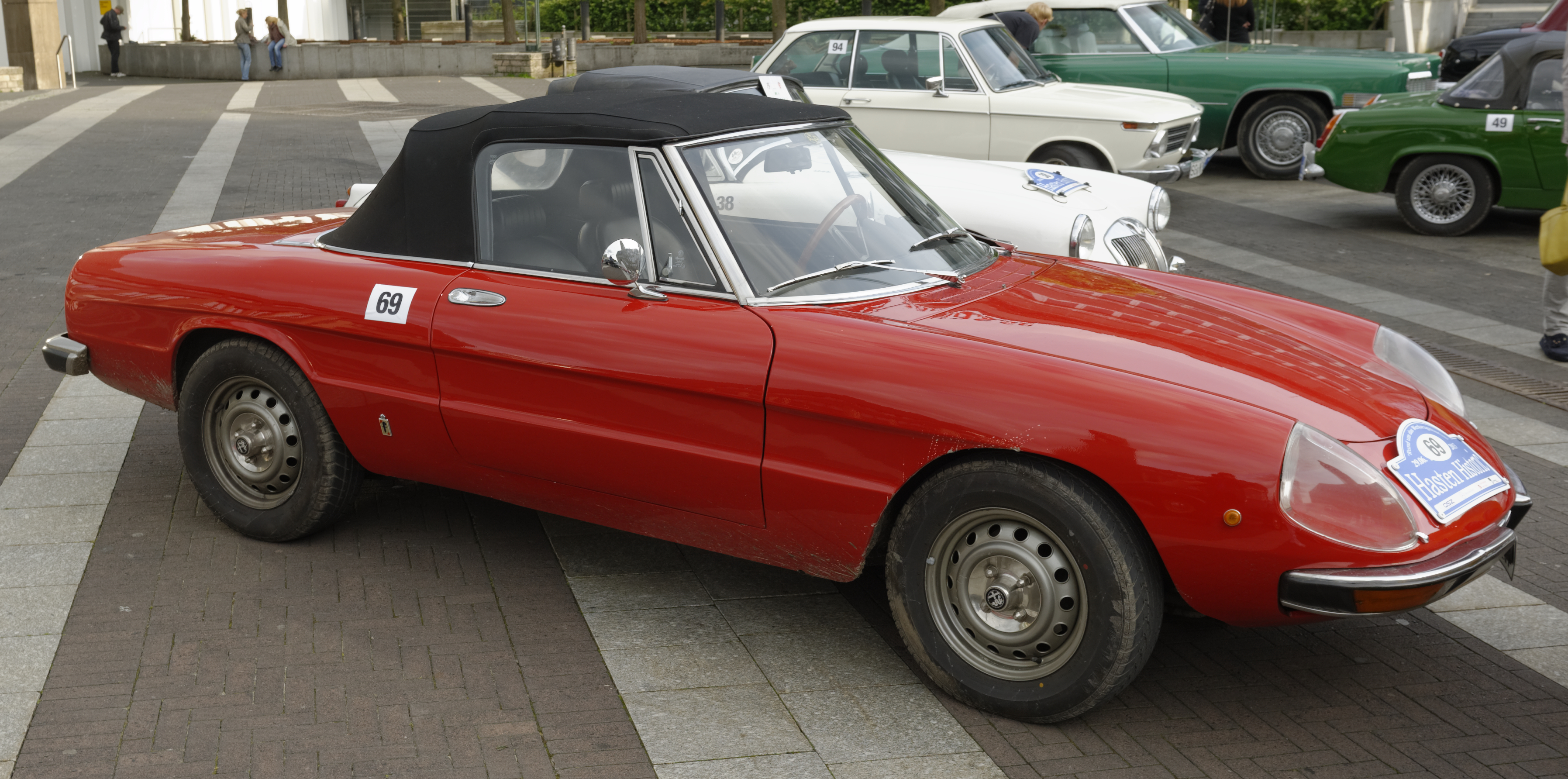 Oldtimershow in Remscheid Juni 2013